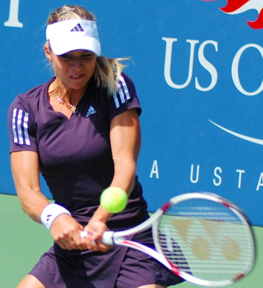 Maria Kirilenko US Open 2009